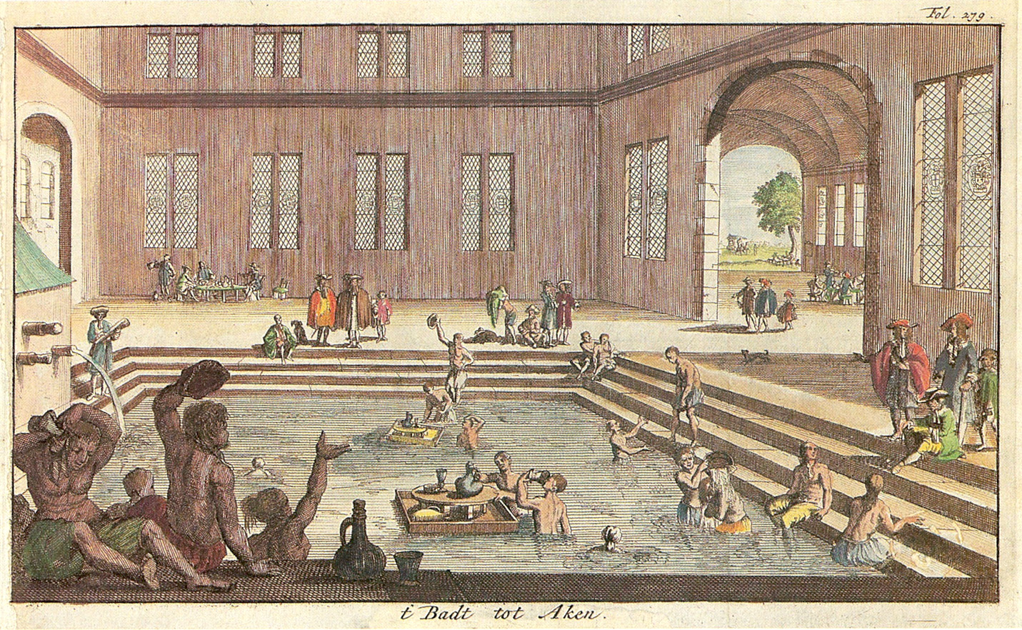 Innenansicht des Kaiserbades in Aachen, Ende 17. Jahrhundert. Schwimmende Tische tragen Krüge für Wasser und Wein.